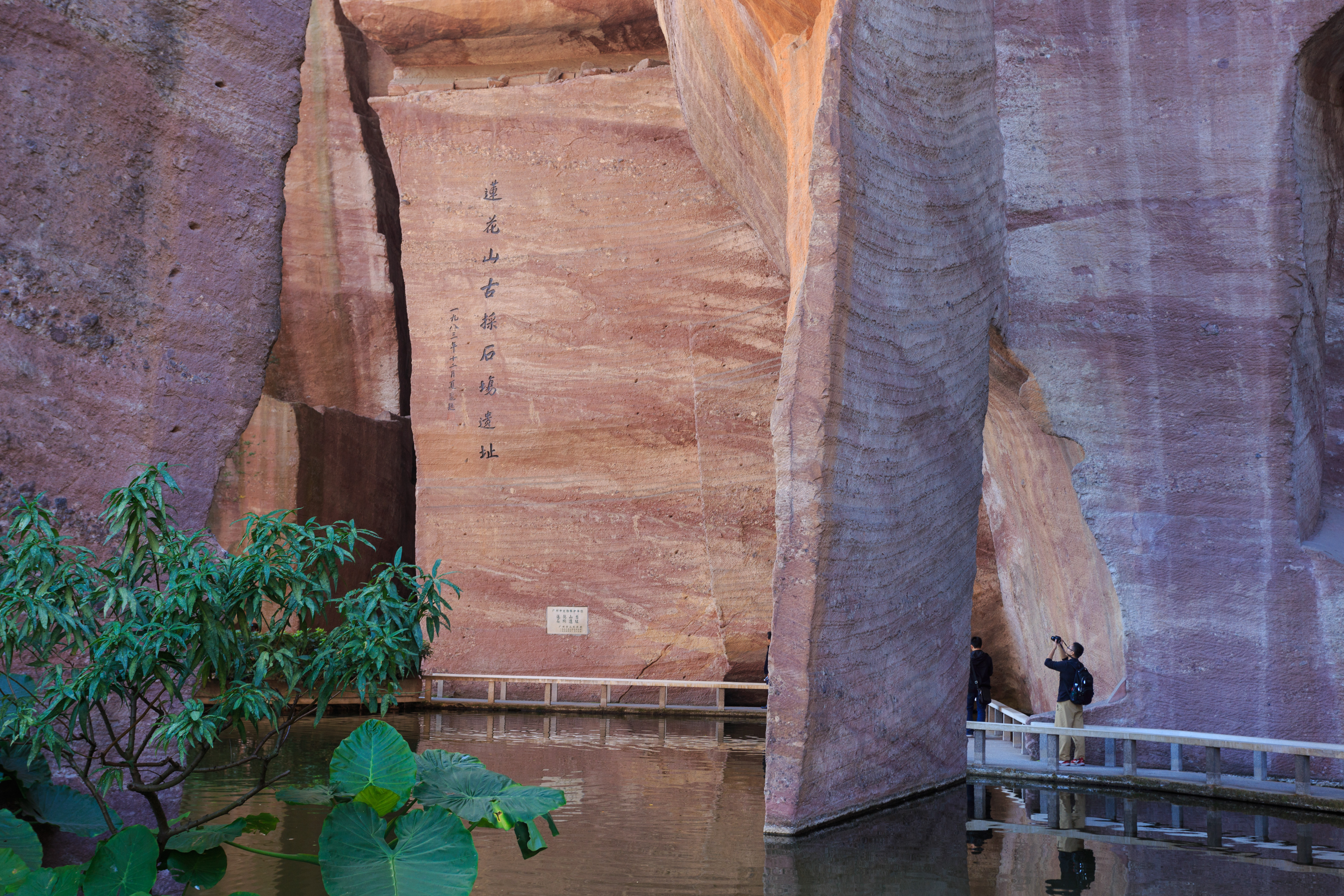 广东省广州市番禺区石楼镇——莲花山古采石场